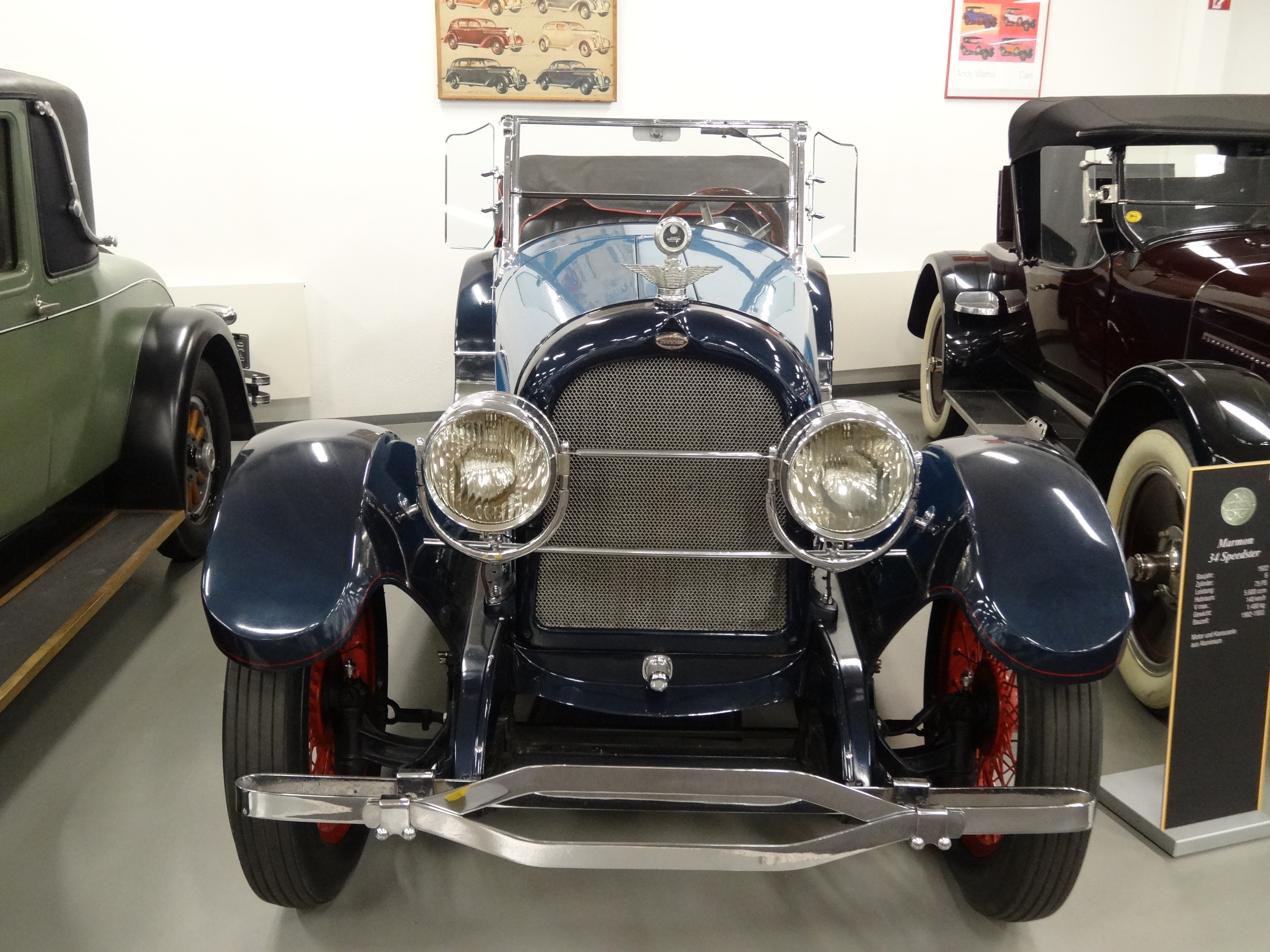 Autosammlung Steim - Schramberg 009 Marmon 34 Speedster